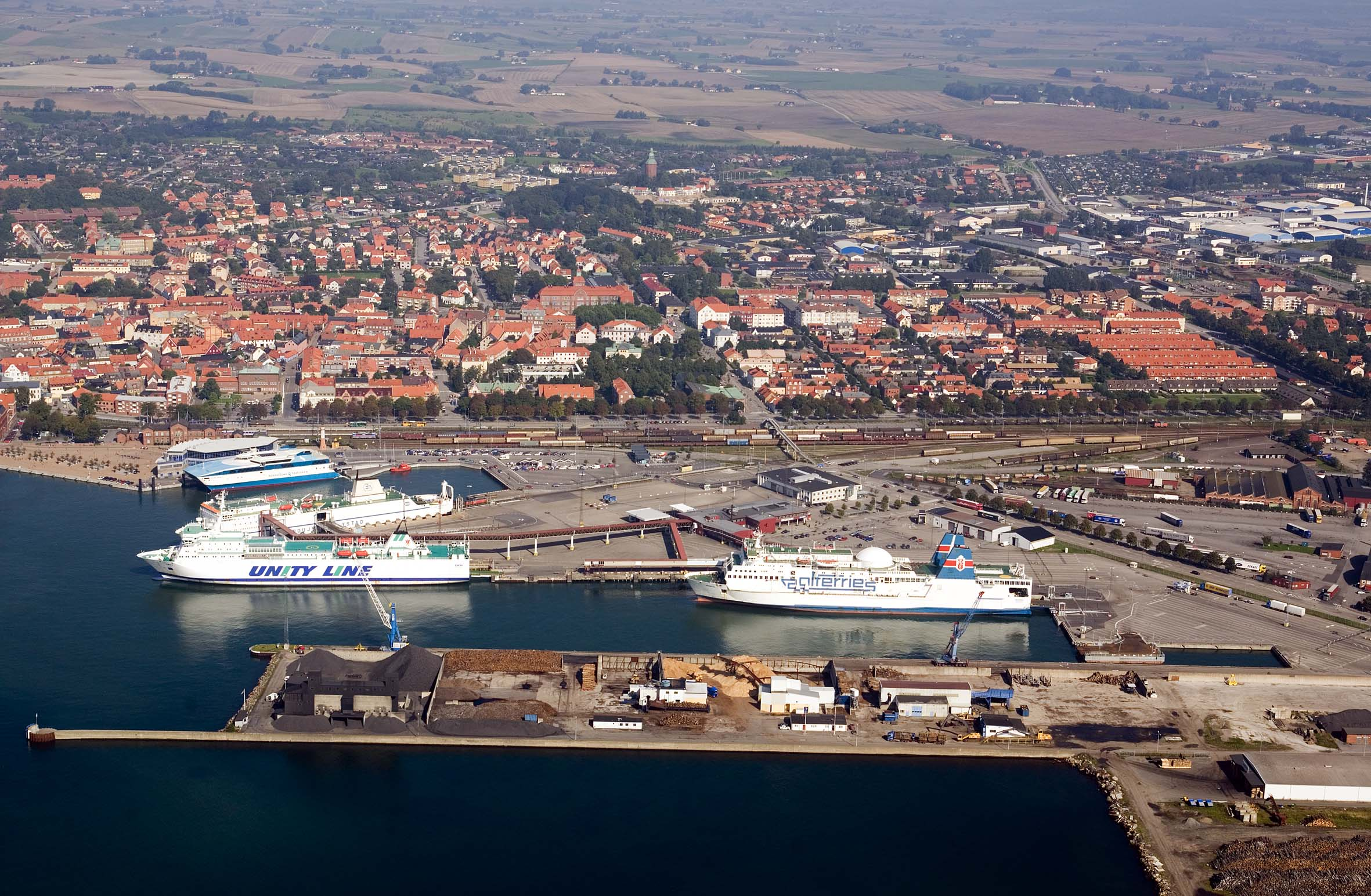 Ystad Havn